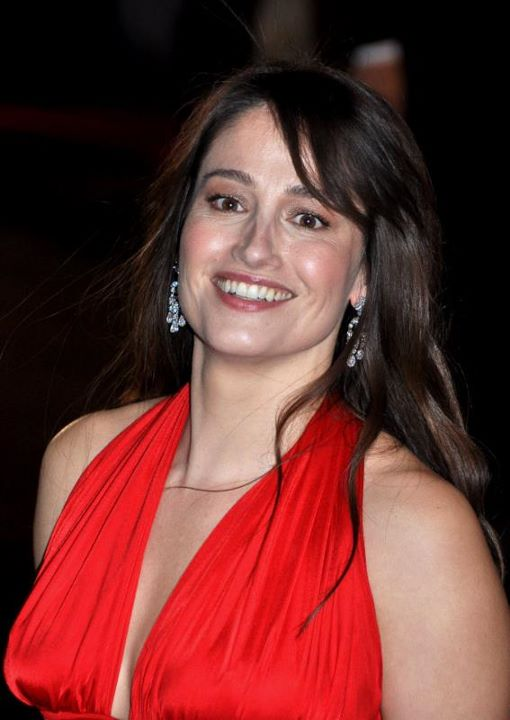 Marie Gillain à la cérémonie des César